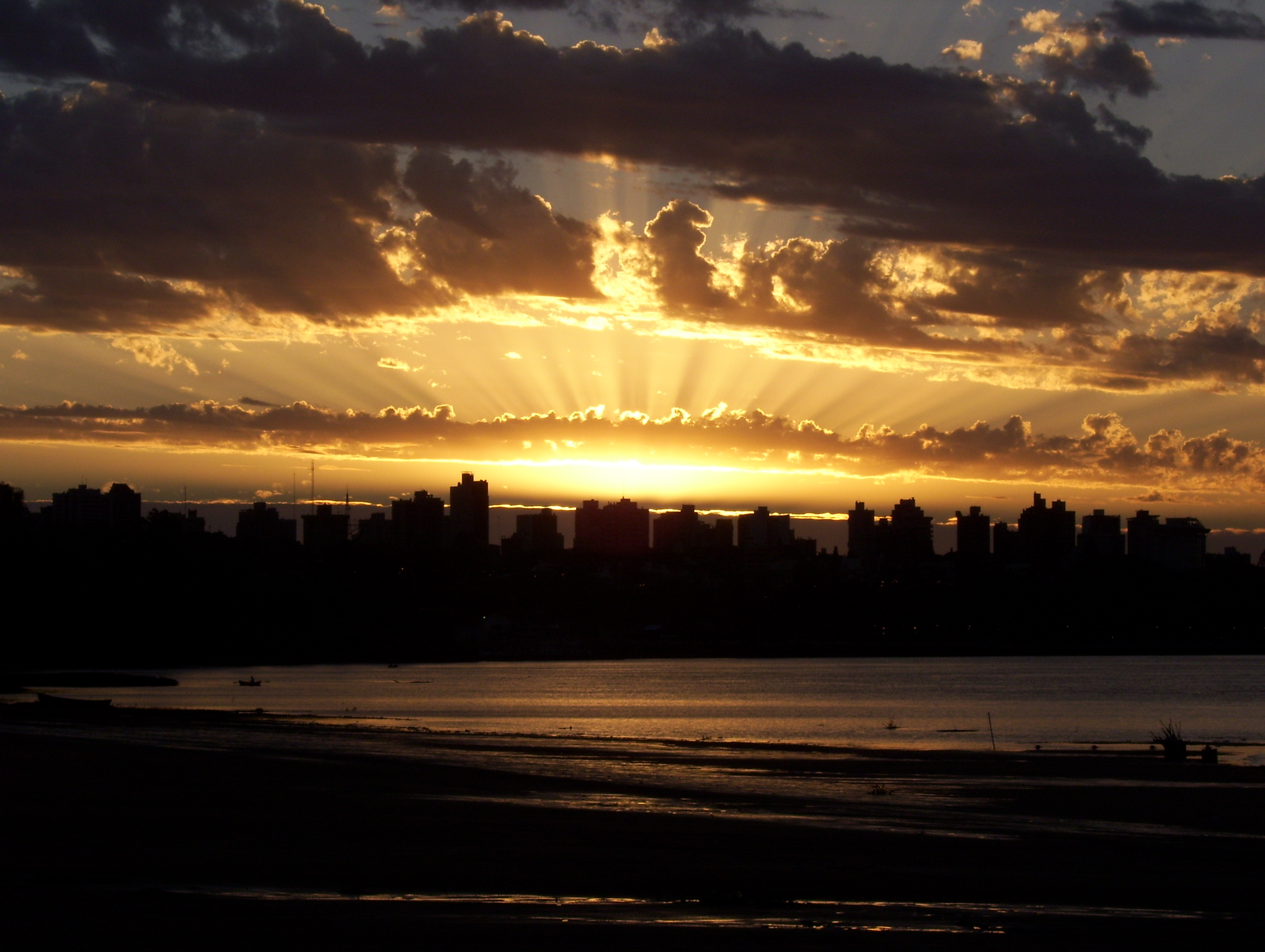 Perfil de la ciudad de Paraná al atardecer, desde la playa del Thompson